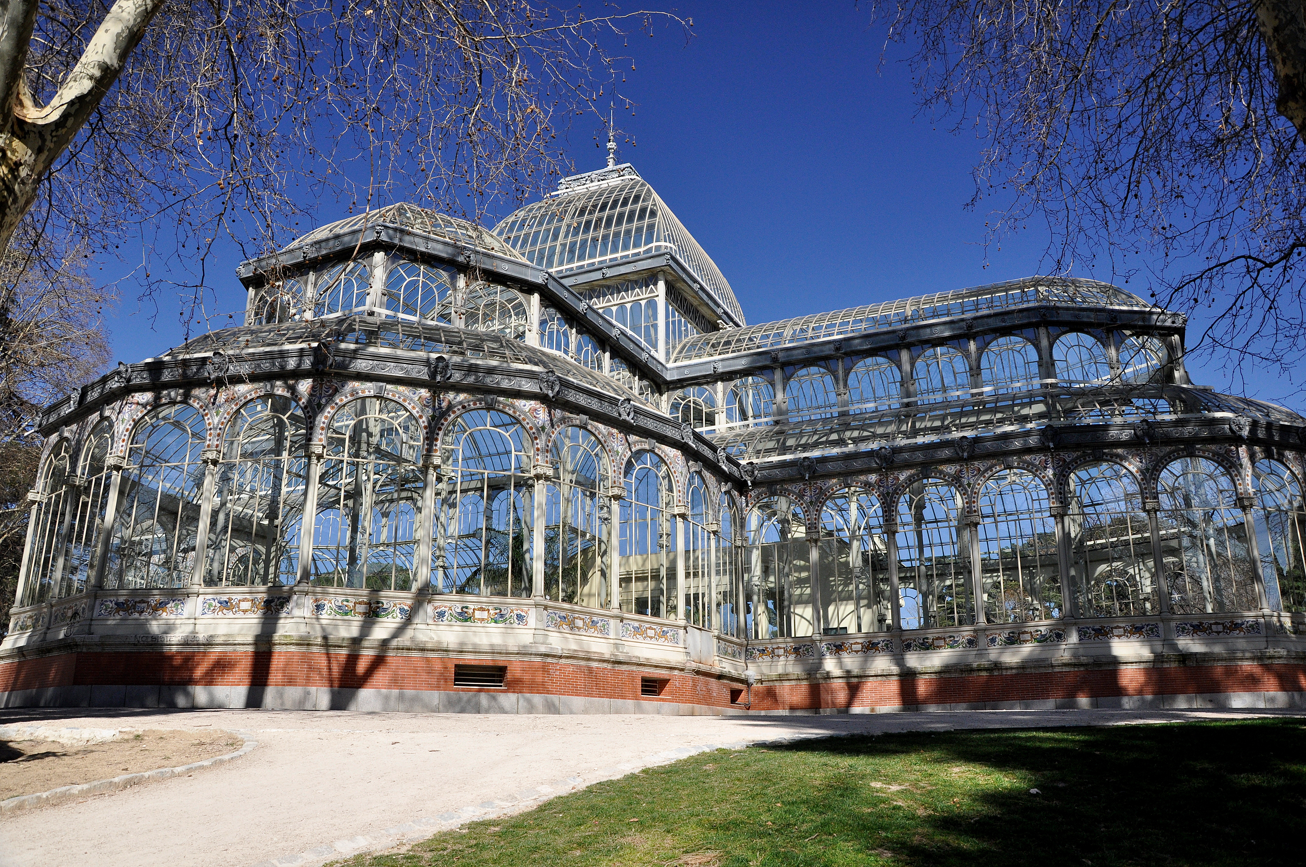 Het palacio de Cristal in het Buen Retiro Park in Madrid, Spanje